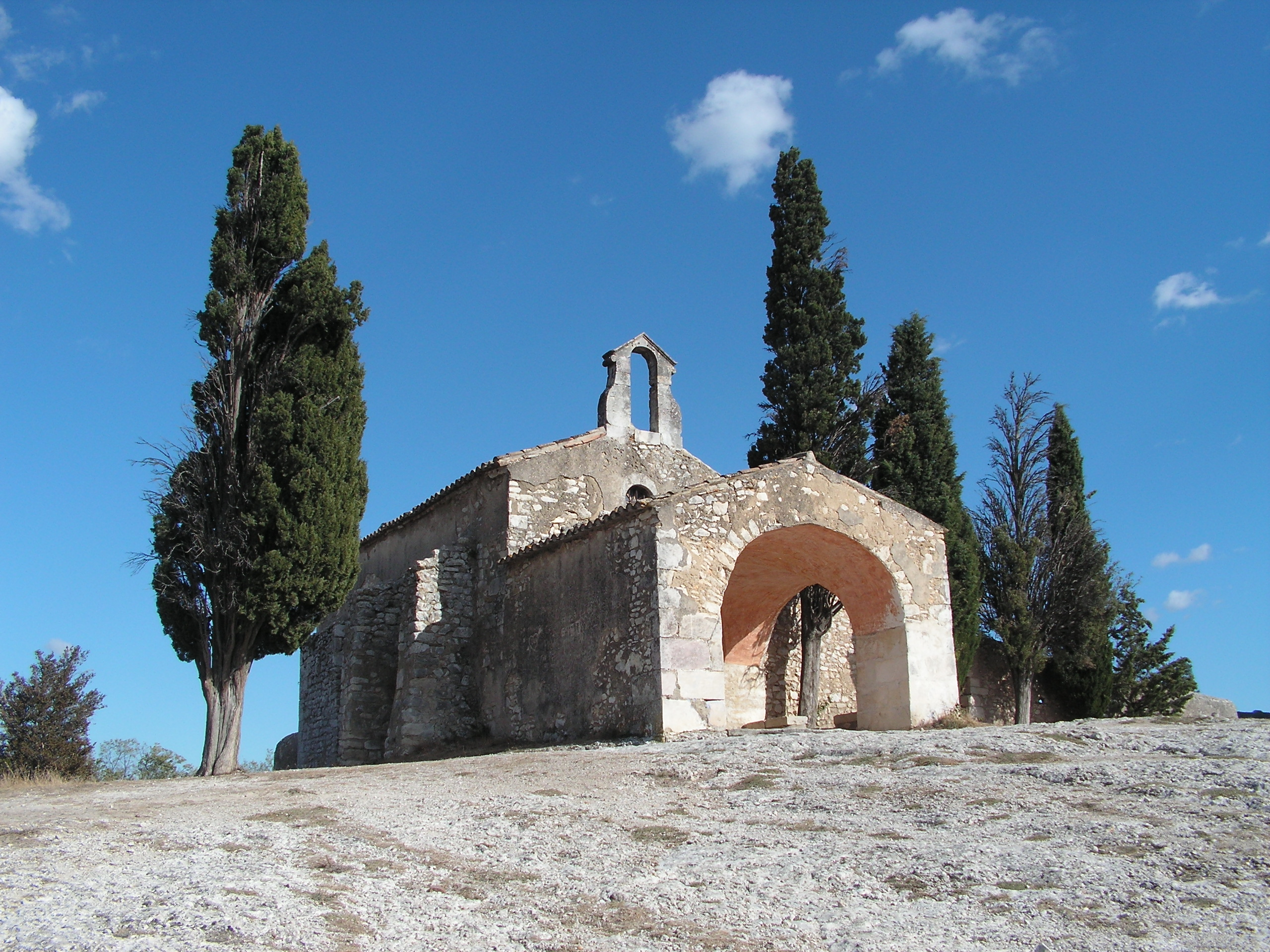 Chapelle bâtie sur la commune d'Eygalières (Bouches-du-Rhône)